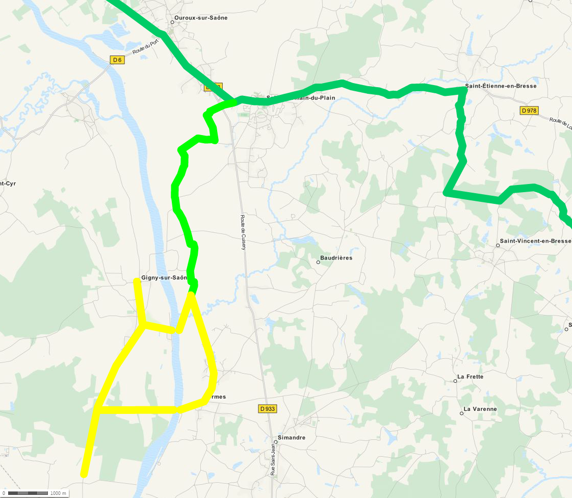 Karte der Römerstraßen in der Bresse - Zweig Ouroux-sur-Saône nach La Colonne - gelb: genaue Straßenführung unbekannt Carte des voies romaines en Bresse - Branche de Ouroux-sur-Saône à La Colonne - jaune: tracé exacte inconnu This map may be incomplete, and may contain errors. Don't rely solely on it for navigation.